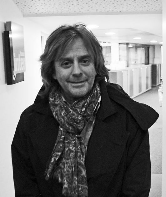 Nuit du 21 au 22 Février. Une nuit avec Pascale Clark et Vincent Lindon Article